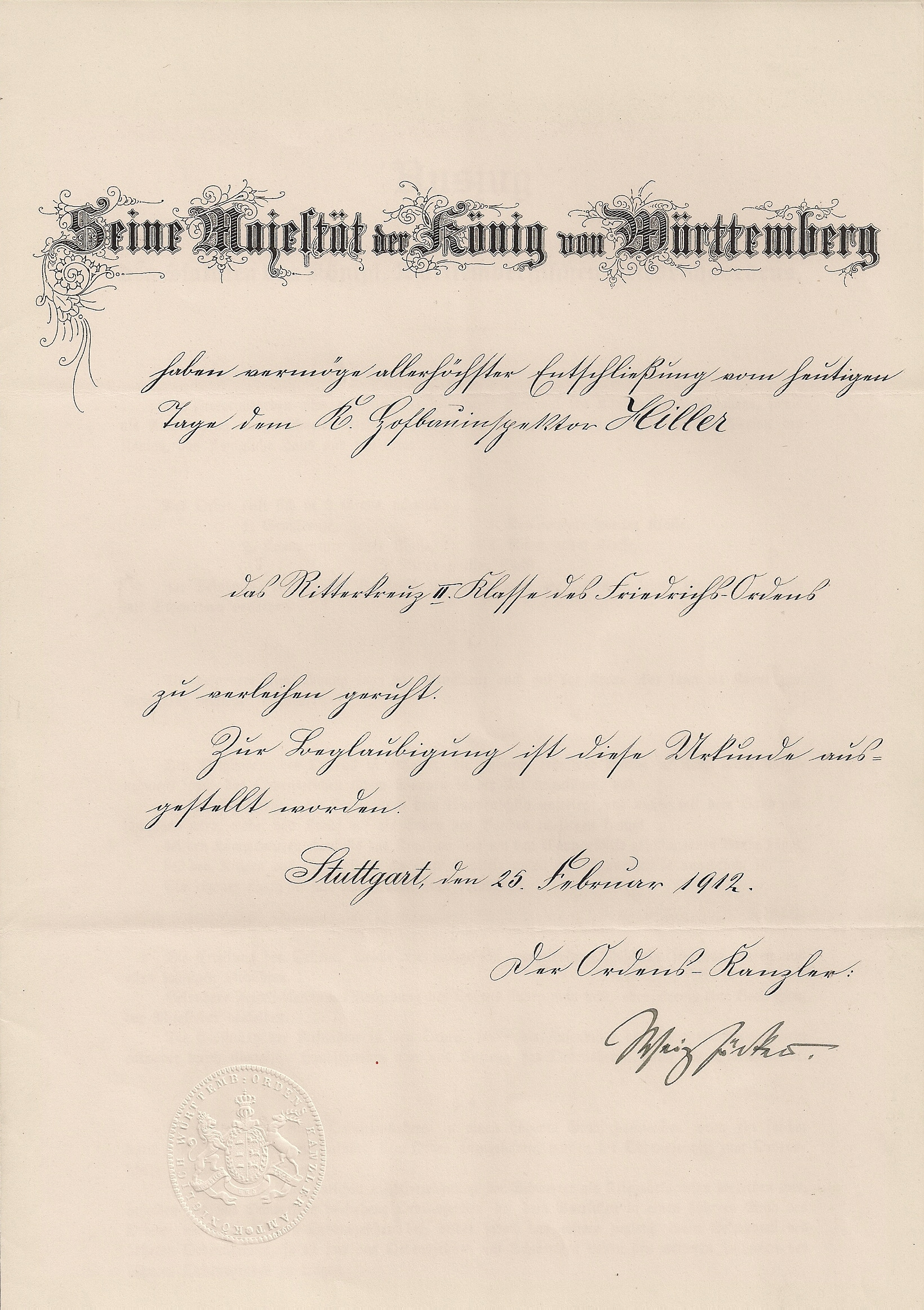 Verleihungsurkunde Ritterkreuz 2.Klasse des Friedrichsorden